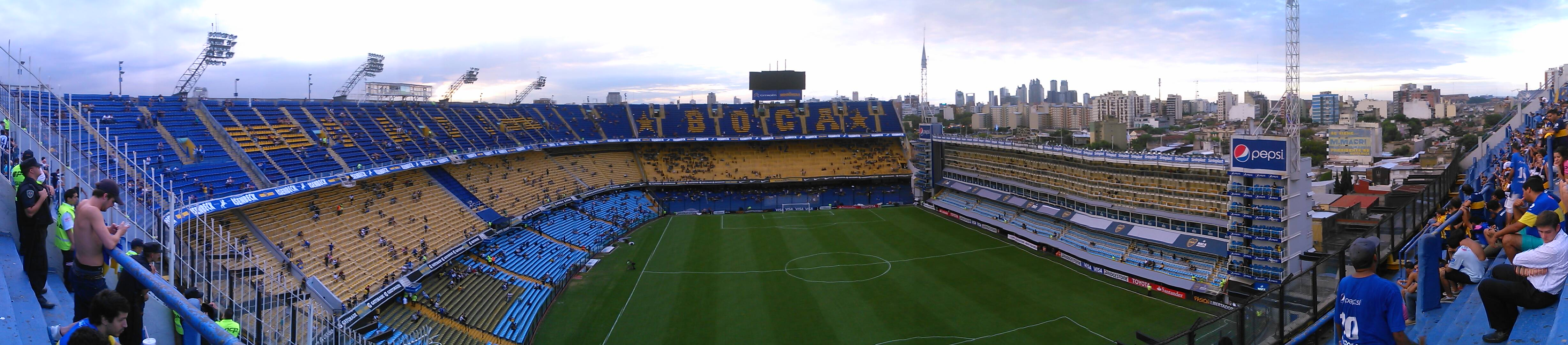 La Bombonera, vista panorámica